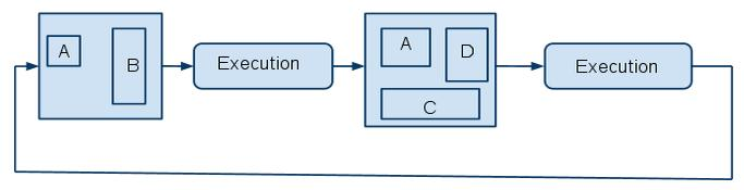 exemple d'une configuration RTR locale. Entre chaque étape de l'exécution, seul un sous-ensemble du matériel est re-configuré.